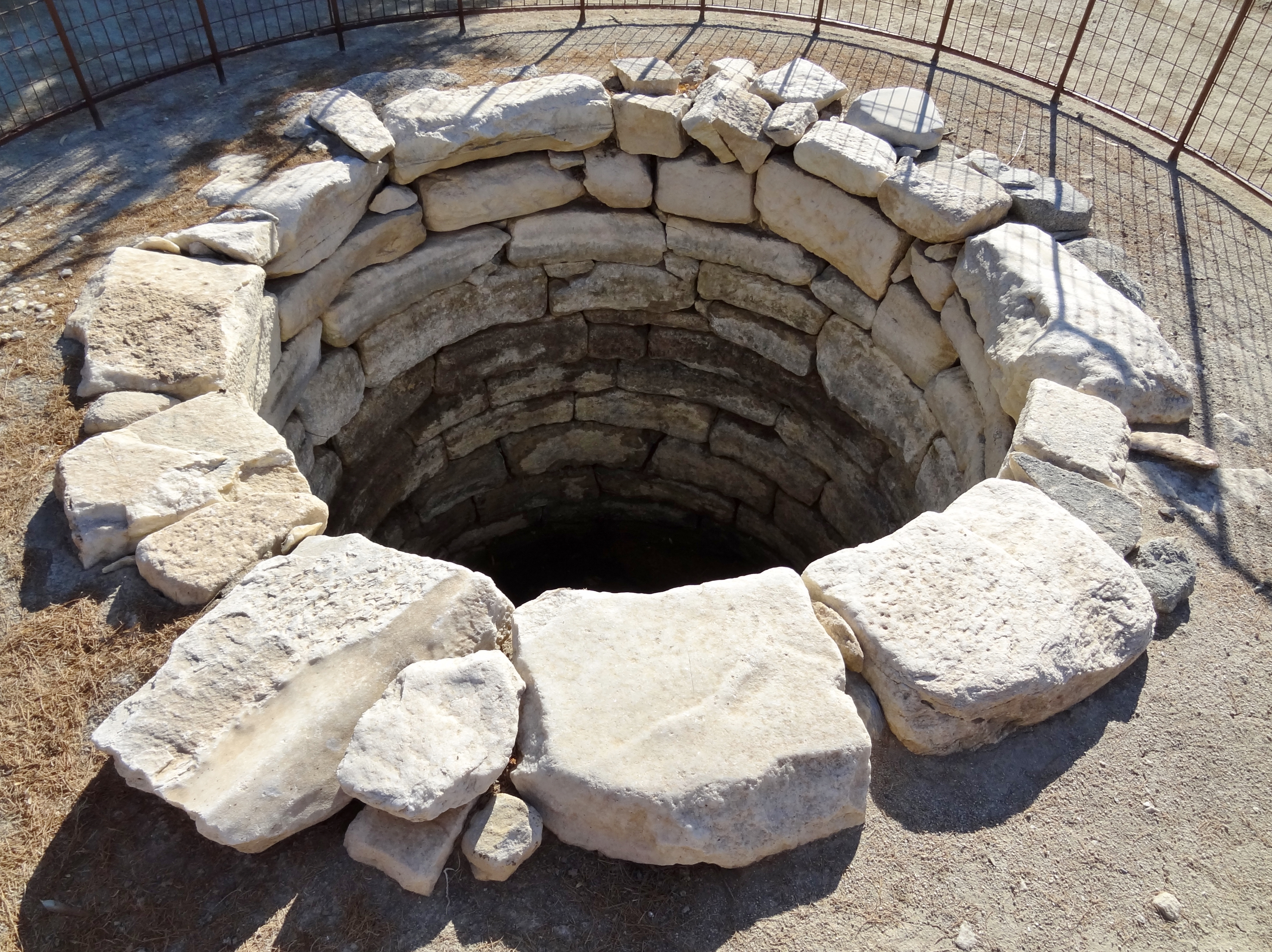 Brunnen auf dem Gelände des Tempels des Dionysos von Yria auf Naxos, Kykladen, Griechenland